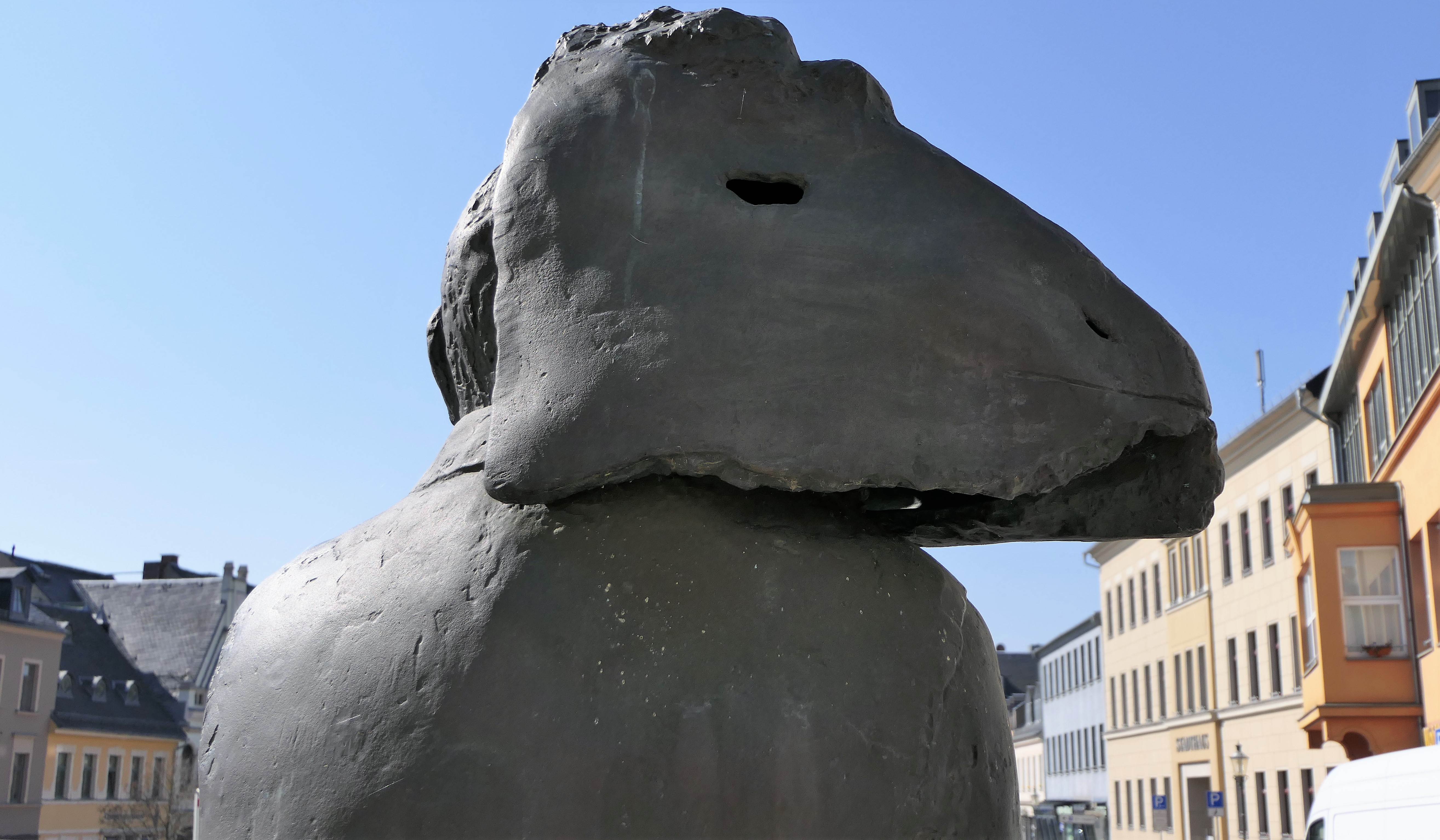 Bronze-Statue "Gesicht zeigen" von Wolfgang Mattheuer auf dem Markt in Reichenbach im Vogtland